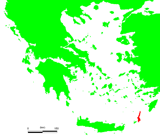 GR Karpathos.PNG (Greek island)